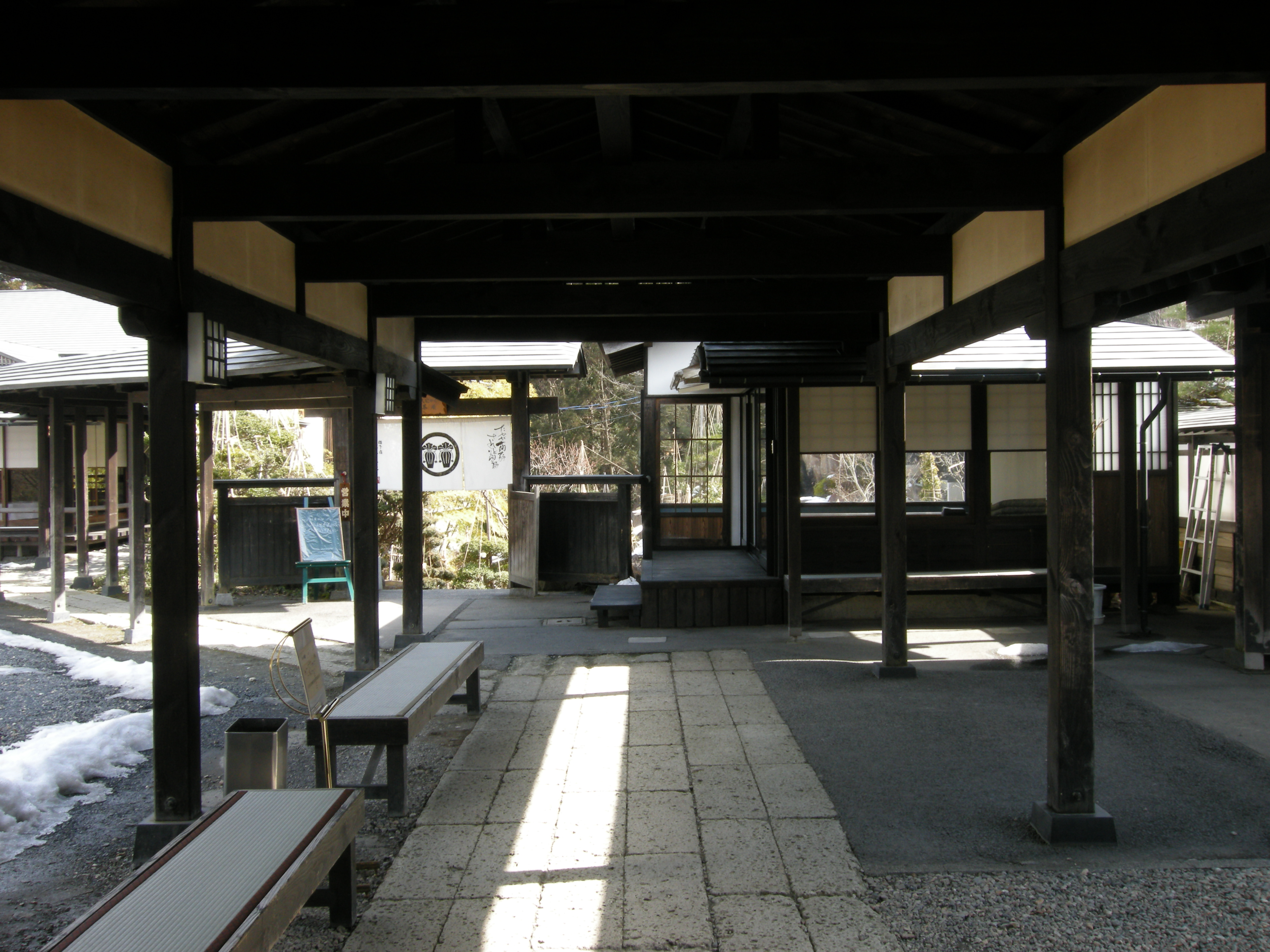 Konnyaku Bansho